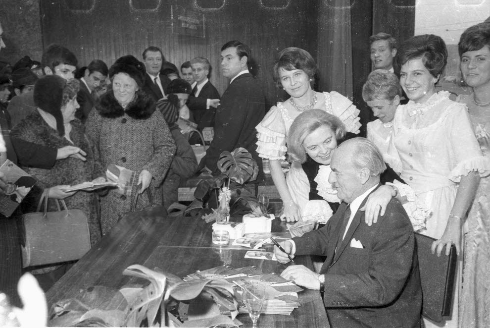 anläßlich der Einweihung der Erweiterung der Vereinsbank.